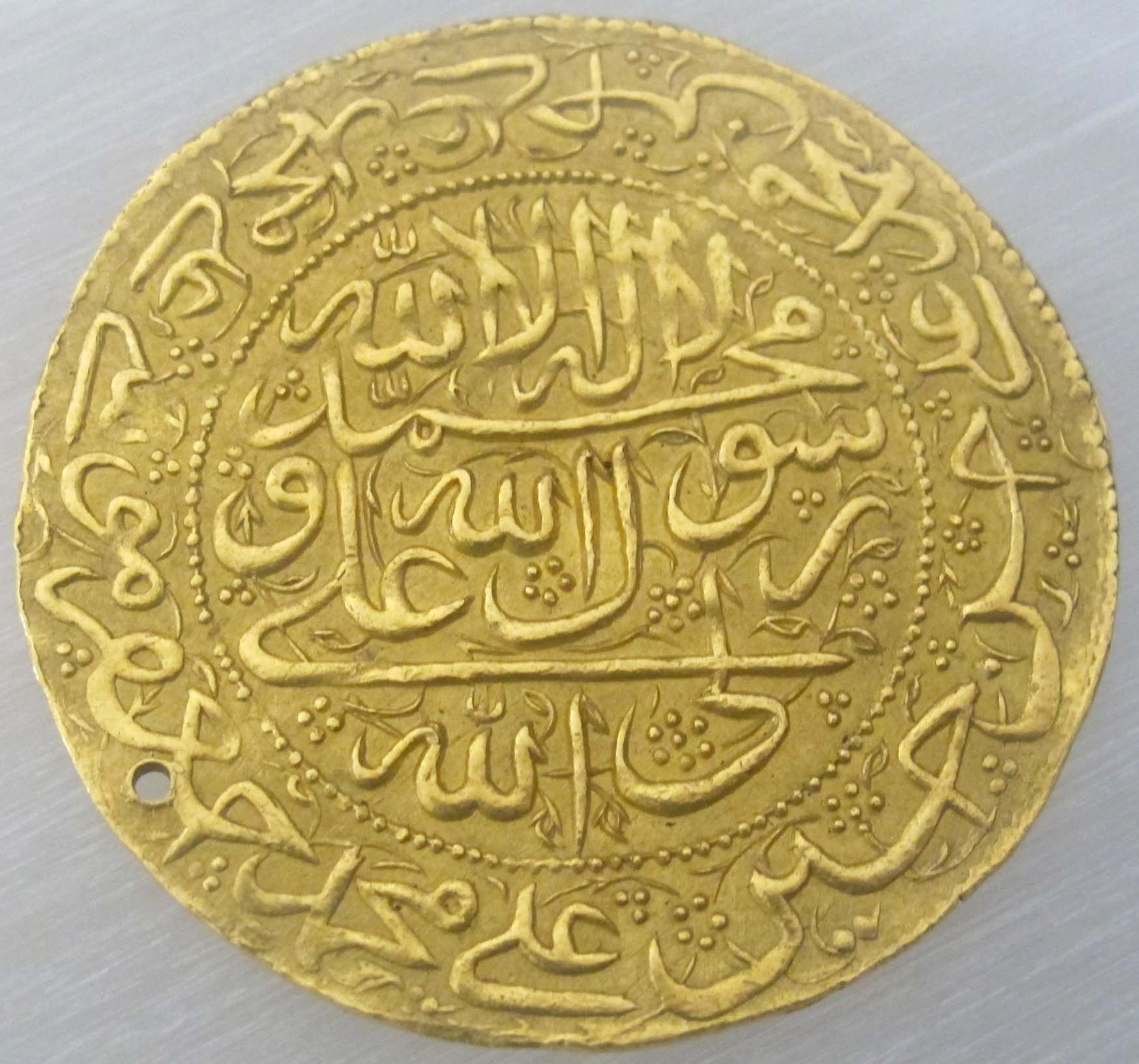 Persia, scià thamasp II, decuplo afshari d'oro, 1722-1732